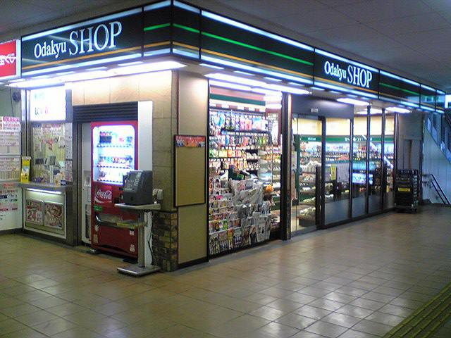 OXSHOP 南林間店